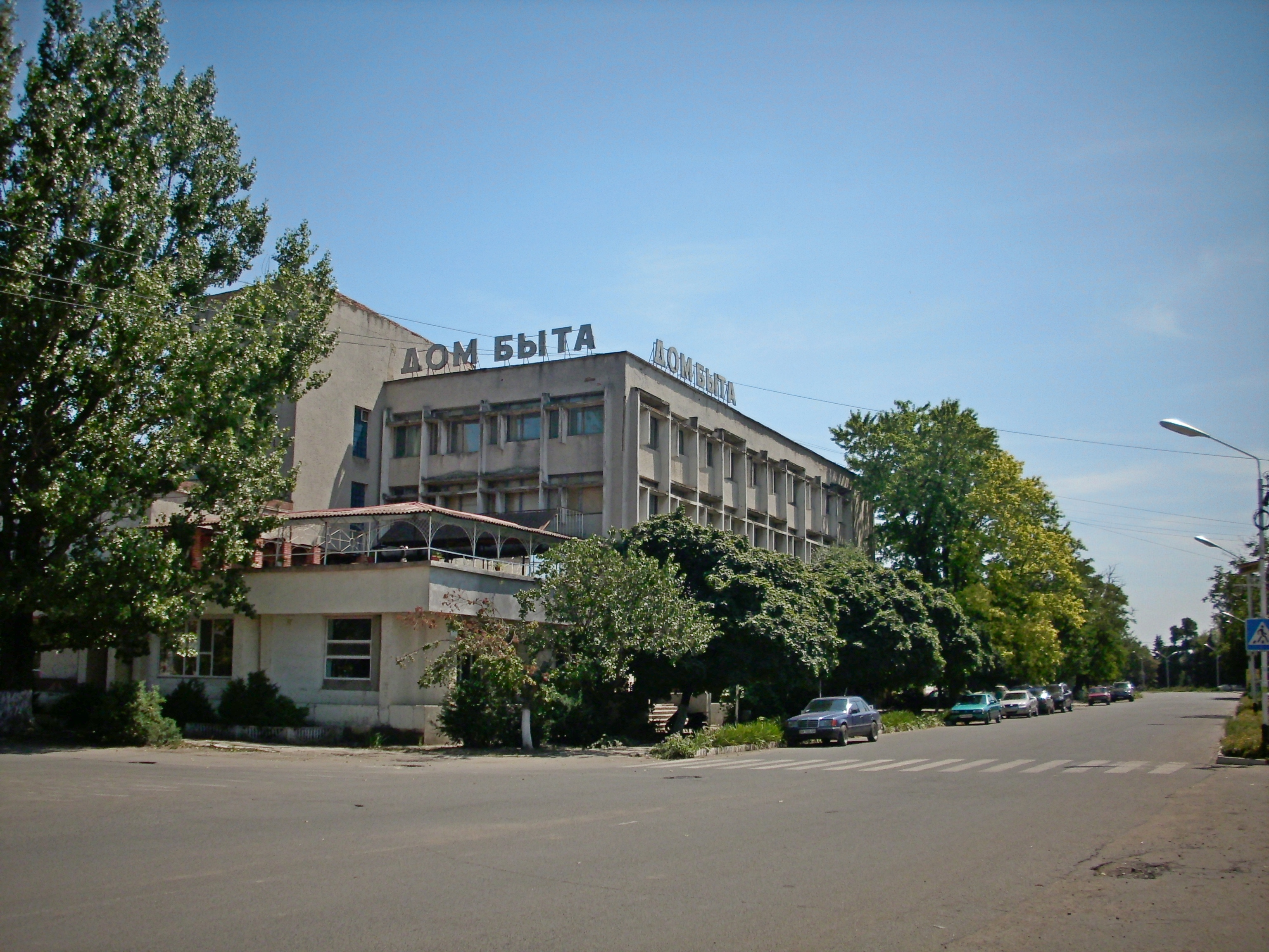 Будинок побуту в Роздільній